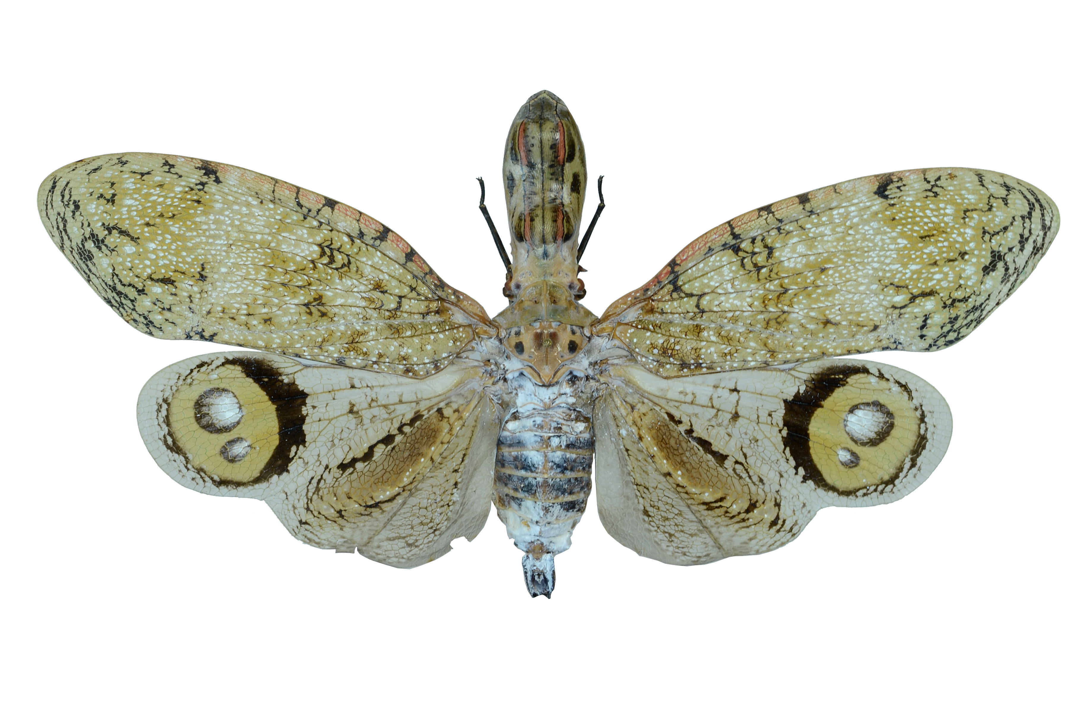 eastern Ecuador